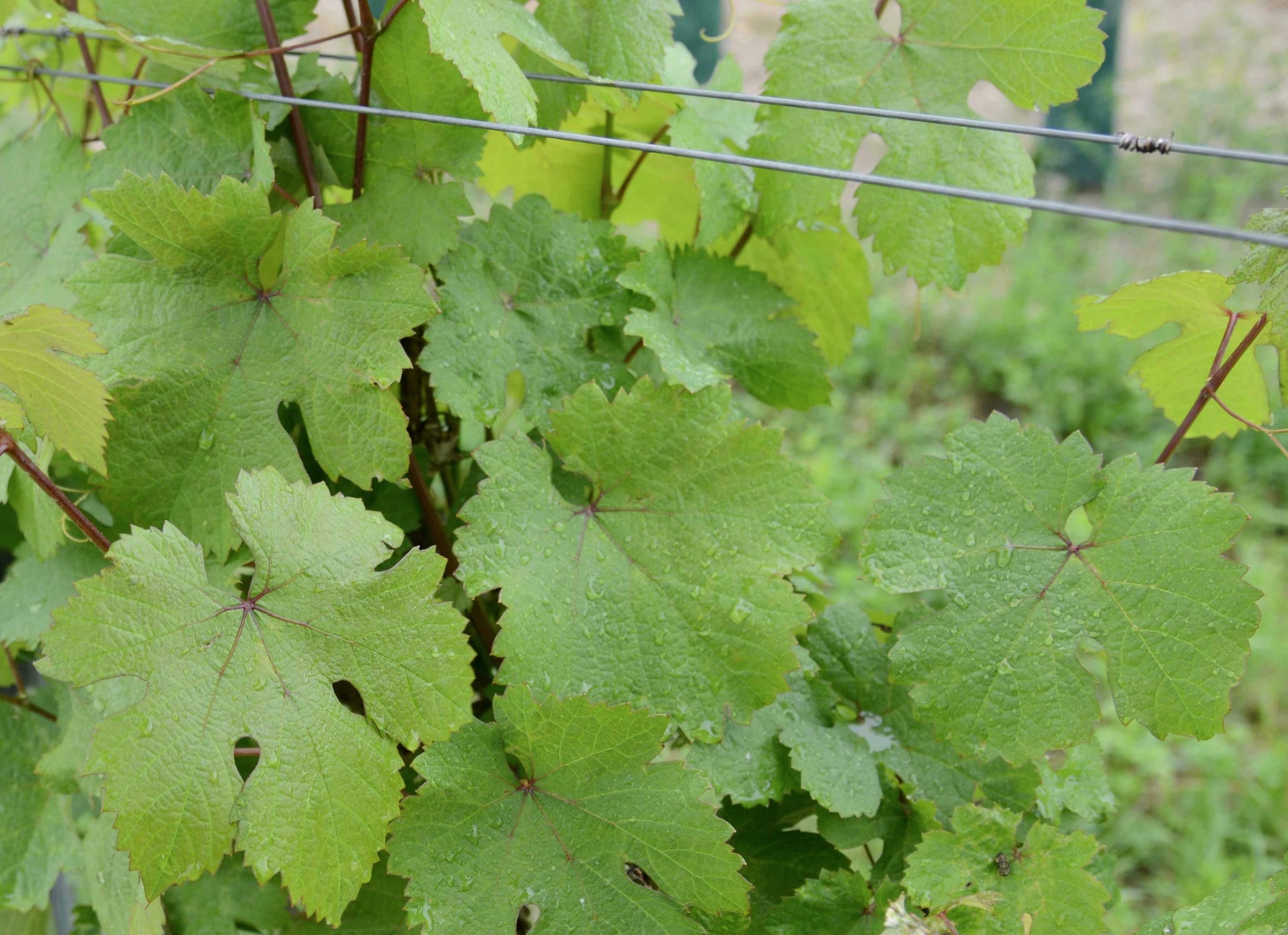 Blätter der Rebsorte St. Georgen im jungen Weingarten in der Lage Viehtrift in St. Georgen